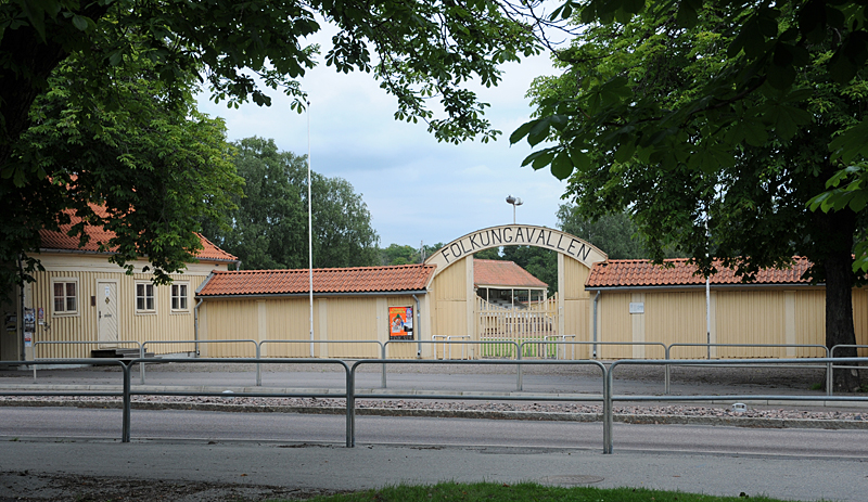 Entrébyggnaderna till Folkungavallen i Nyköping uppfördes till Lanbruksmötet 1914.